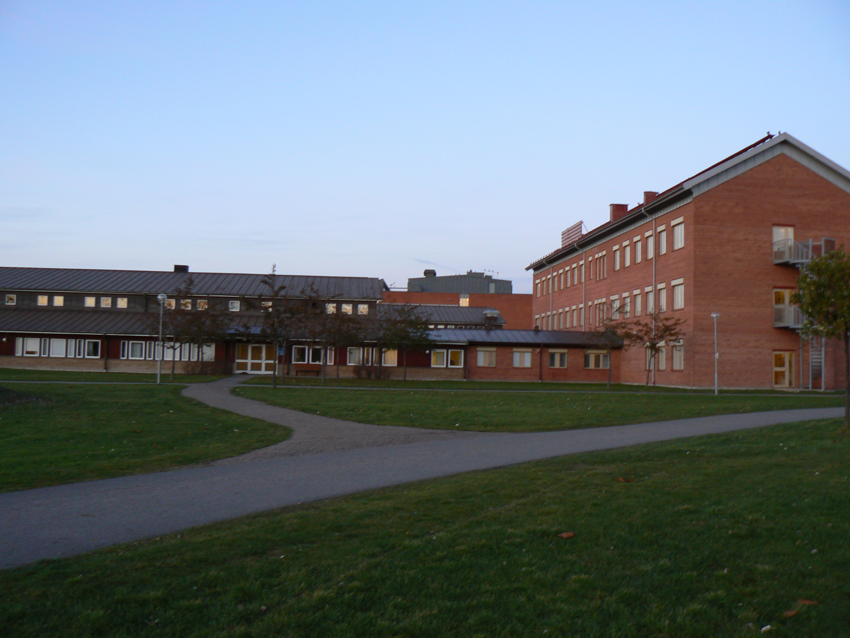 I Building, Linköping University. Photo by Skvattram 2006-11-09